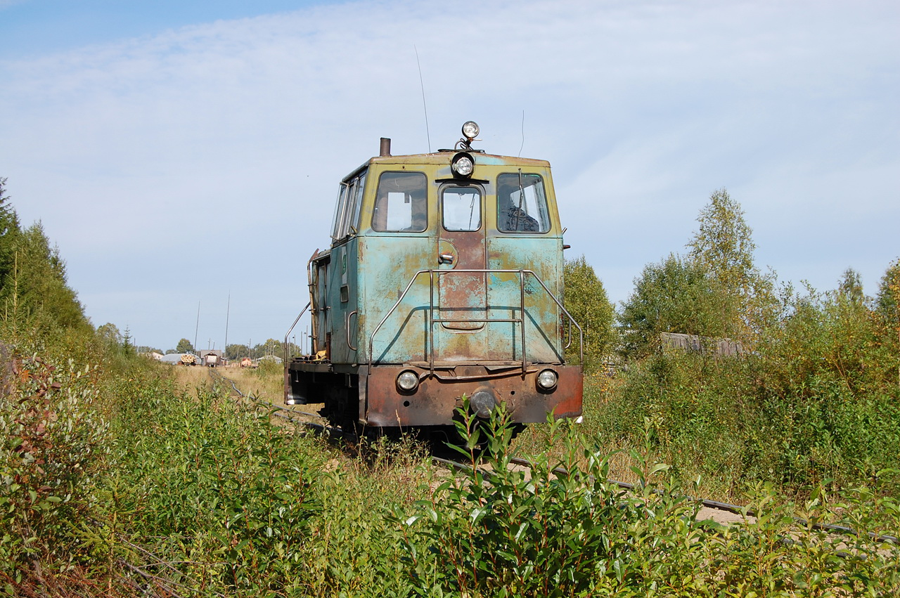 Тепловоз ТУ6А-2313, Удимская УЖД